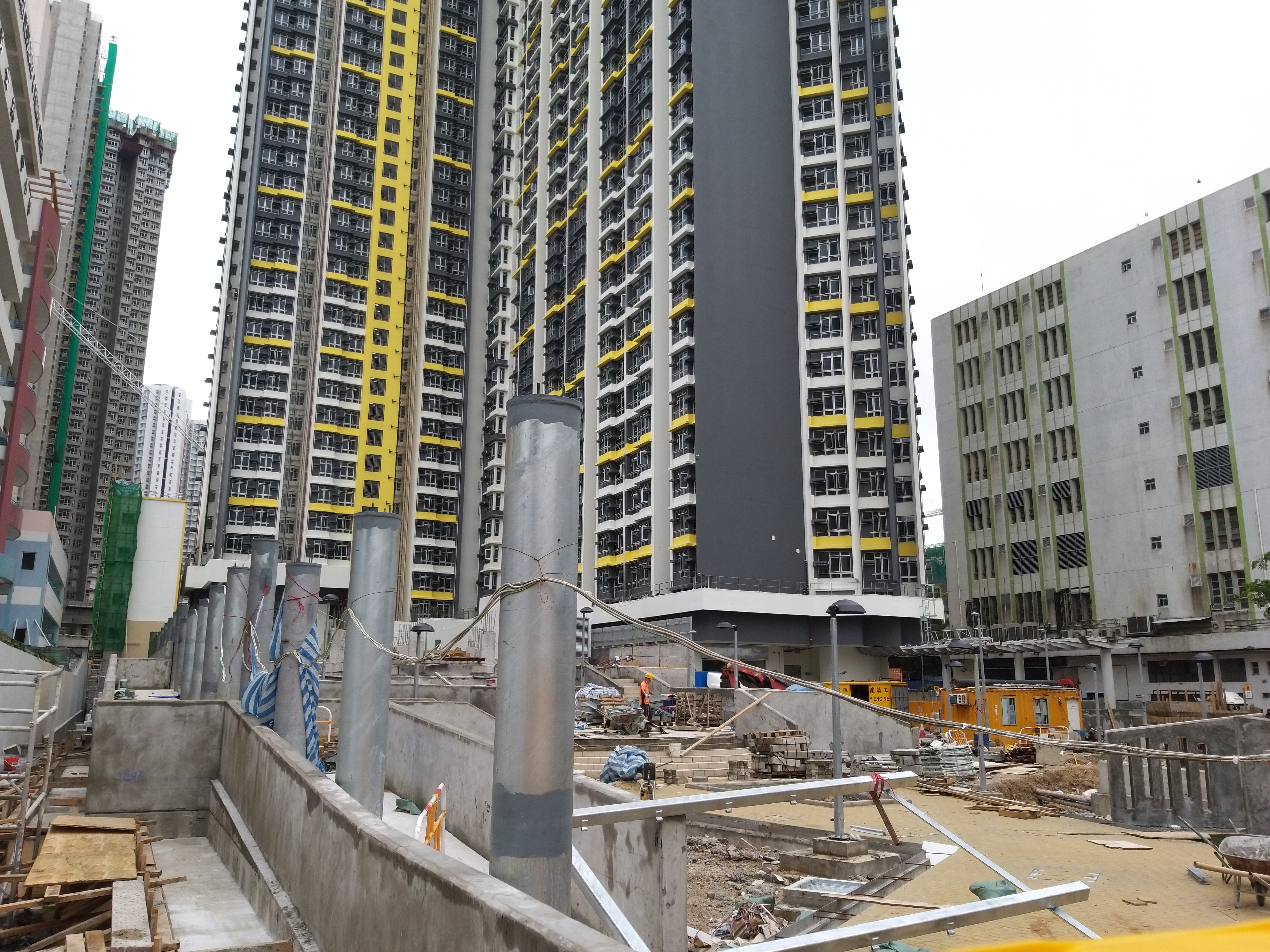 行人通道工程進行中，而右方位置正在清場